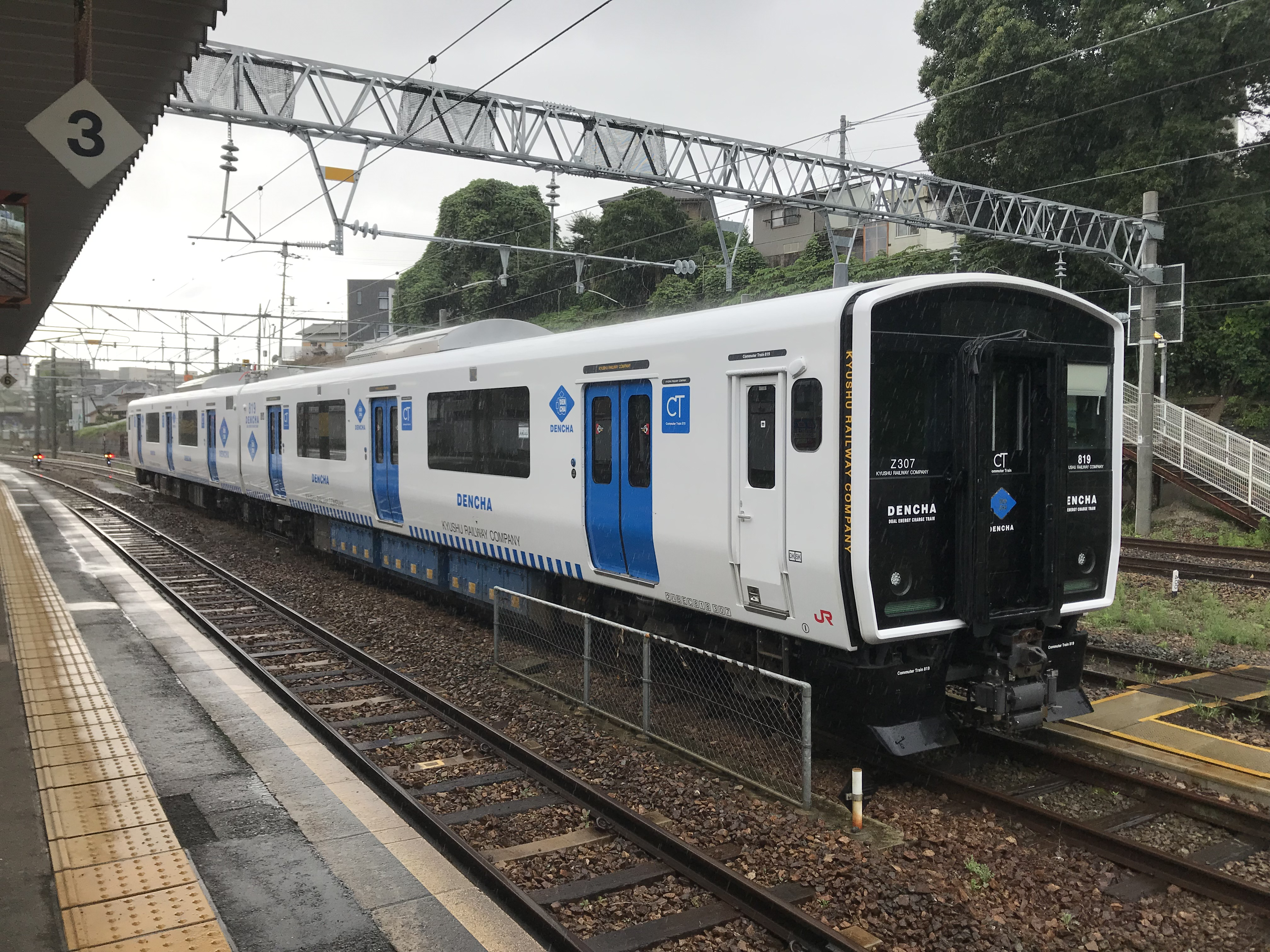 香椎駅に留置中の香椎線列車